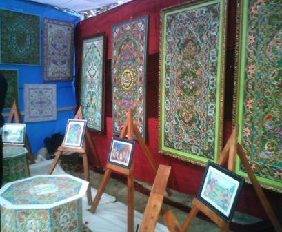 Орнаменты художников Истравшана 2011